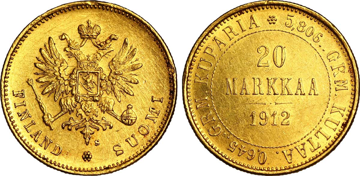 客家語/Hak-kâ-ngî: FINLANDE, pièce de 20 markkaa frappée en 1912 à Helsinski durant l'administration Russe. La Finlande avait obtenu en 1864 le droit de frapper monnaie. En adoptant l'étalon or en 1877, elle s'aligna sur le système de l'Union Latine et frappa des monnaies de 10 et de 20 markkaa de 1878 à 1913. Les pièces sont frappées suivant les termes de la loi du 9 août 1877.